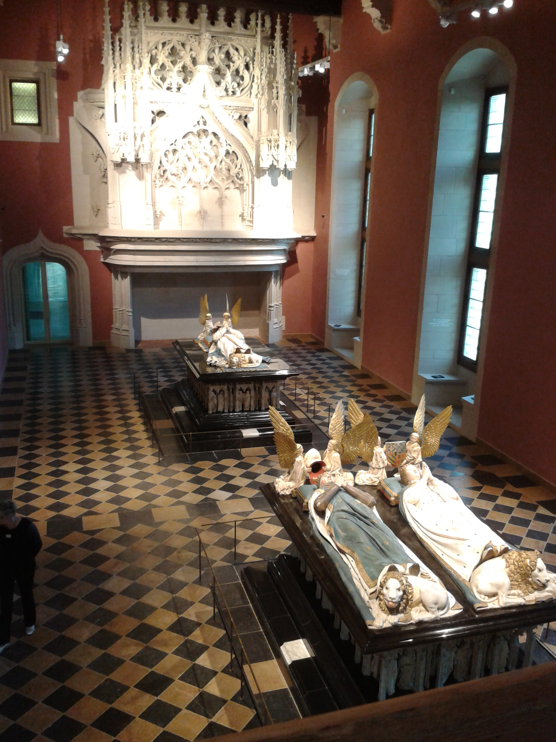 La salle des tombeaux vue depuis le balcon des musiciens